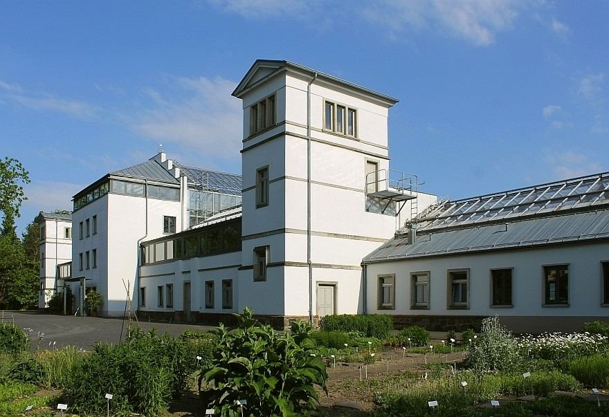 Botanischer Garten der Universität Leipzig, Ansicht der Nordfassade des Altbaus; dahinter angelagert die Schaugewächshäuser auf der Südseite